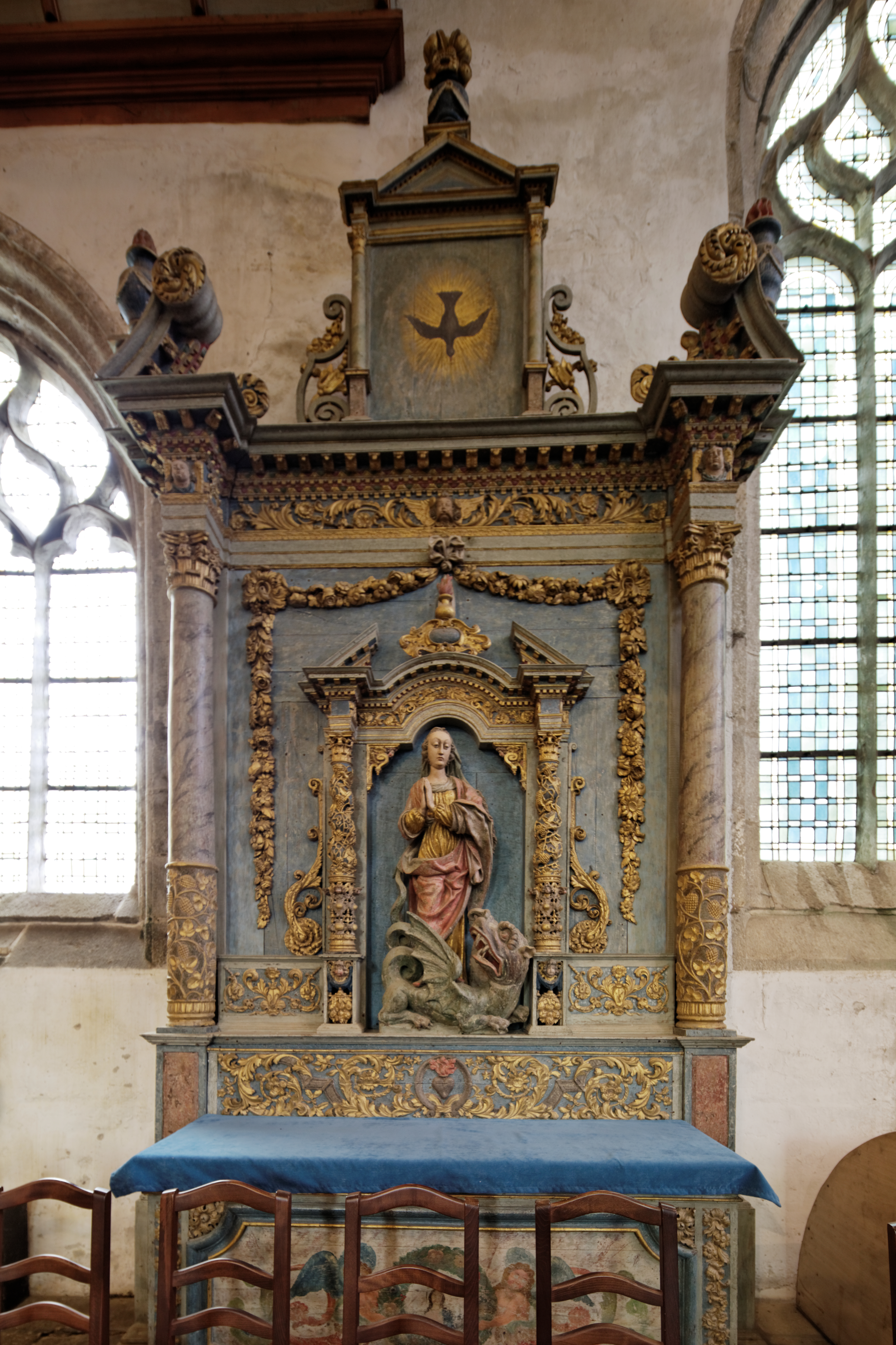 L'église Notre-Dame de l'enclos paroissial de Lampaul-Guimiliau dans le Finistère..